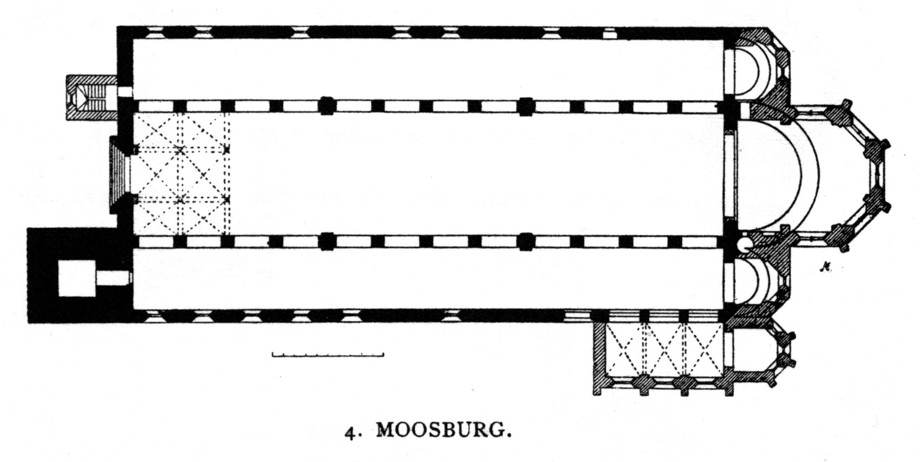 Moosburg, St. Kastulus, floor plan.